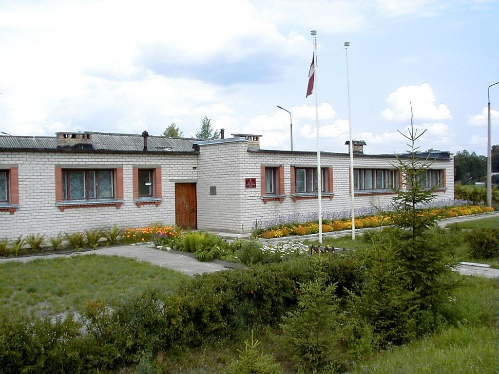 Subates pilsētas dome 2000-07-23